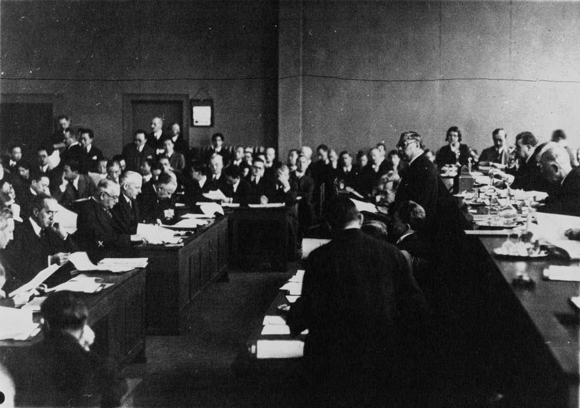 Sesión de la Sociedad de Naciones sobre Manchuria. Habla el delegado chino, Yeng, 1932.